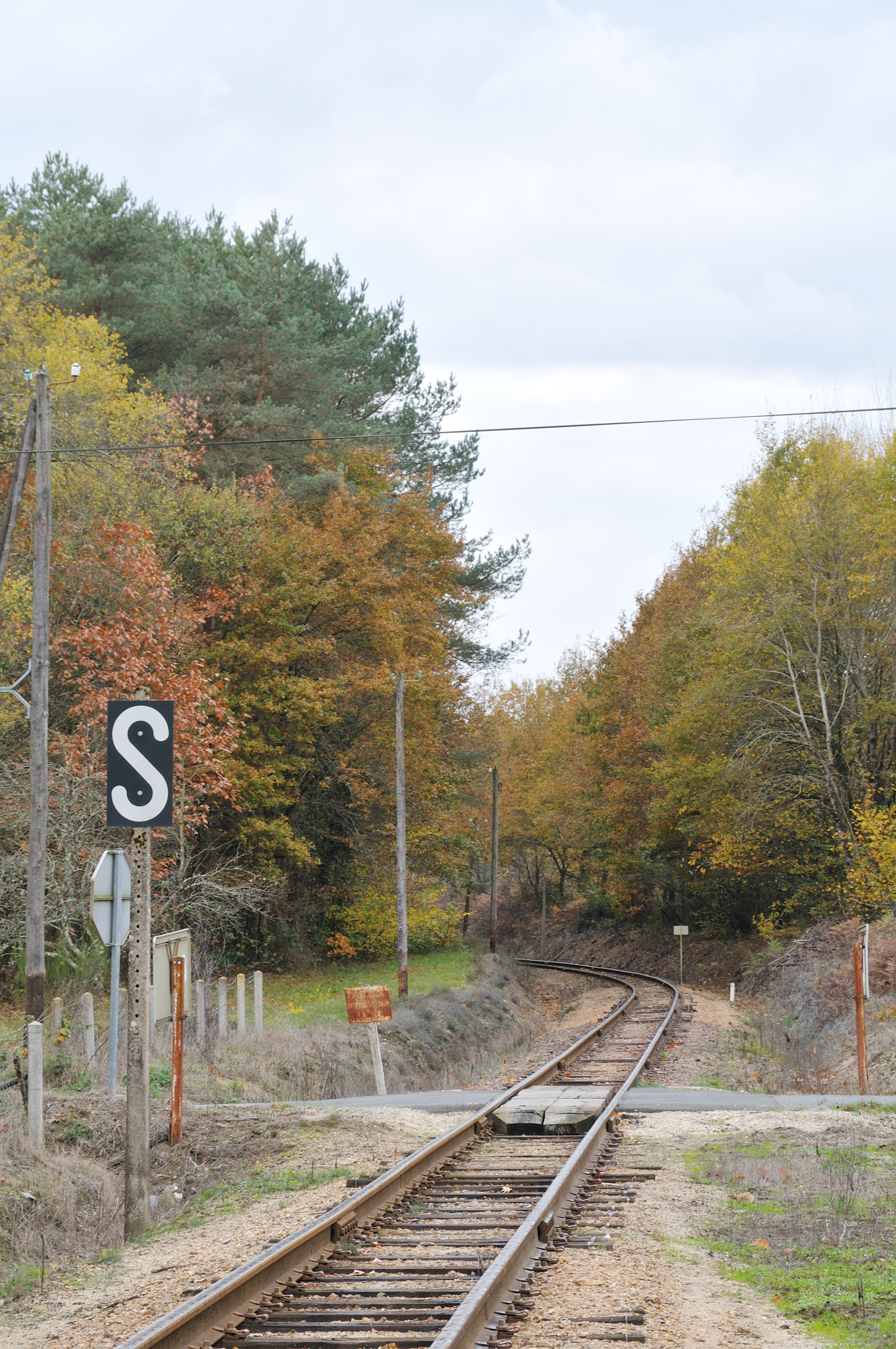 Passage à niveau près de la gare de Loreux, Loir-et-Cher, France - La pancarte représentant un "S" blanc sur fond noir indique au mécanicien de siffler à proximité d'un passage à niveau non gardé.